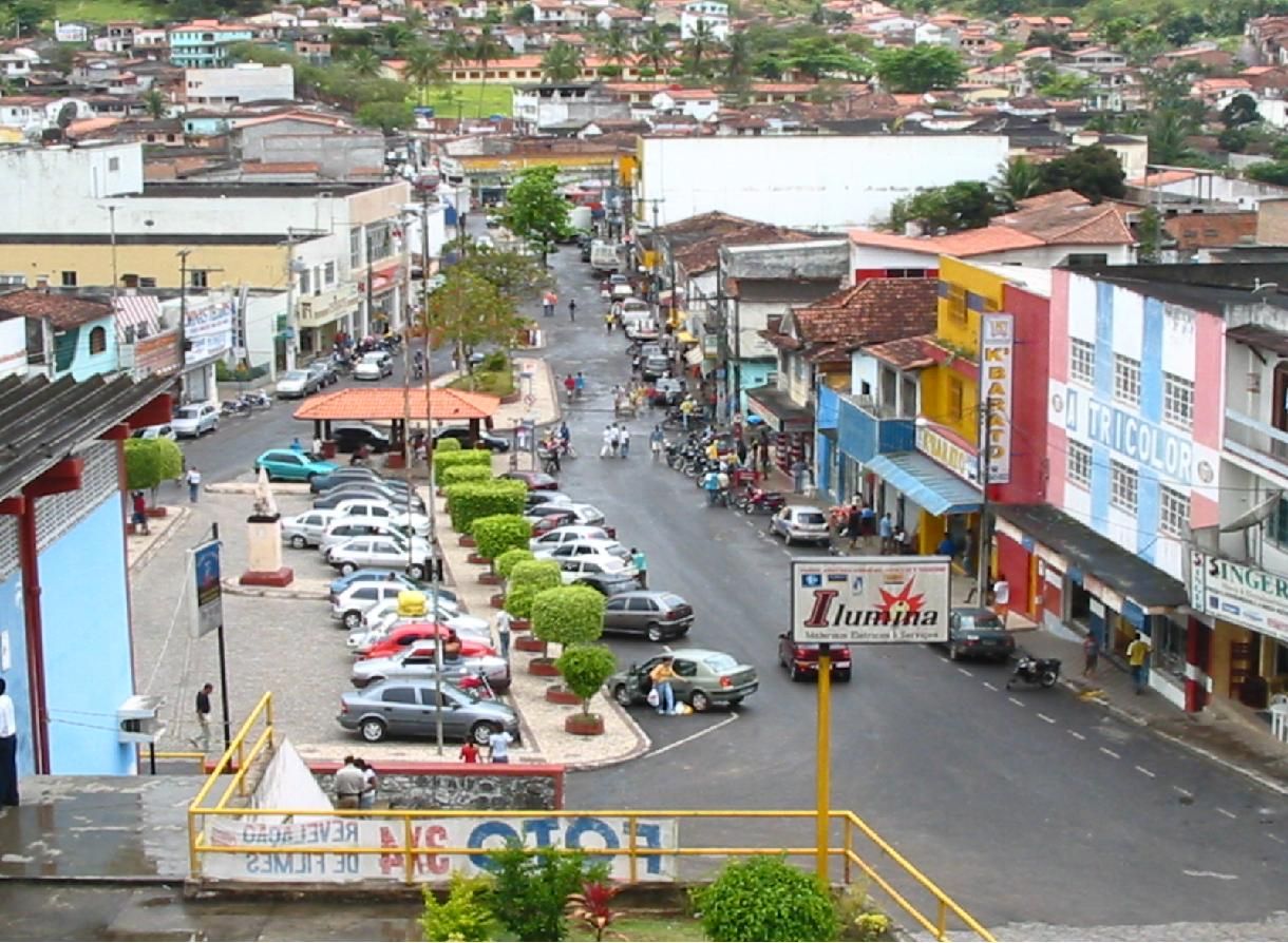 Comércio de Catu.